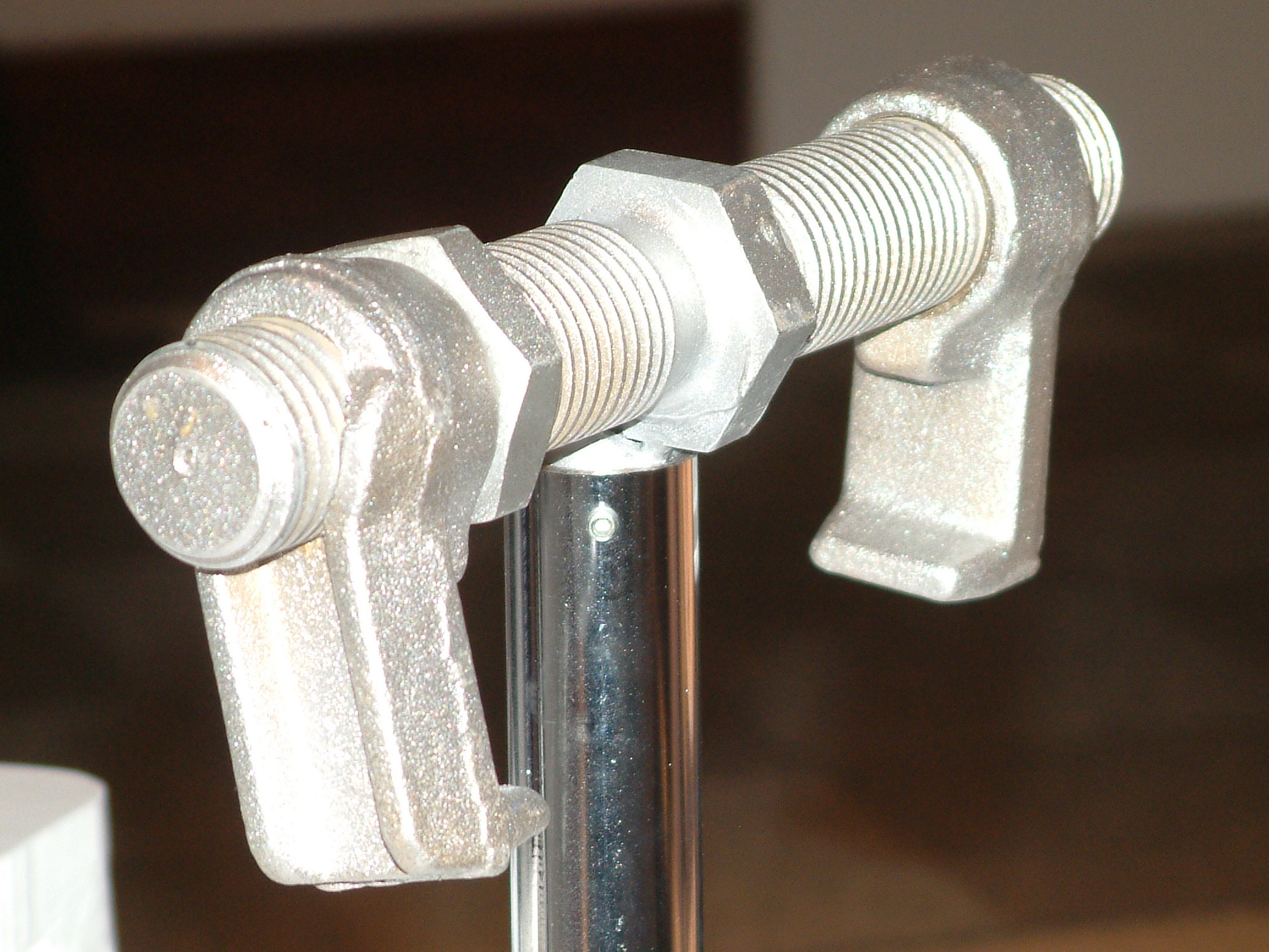 Europort 2009